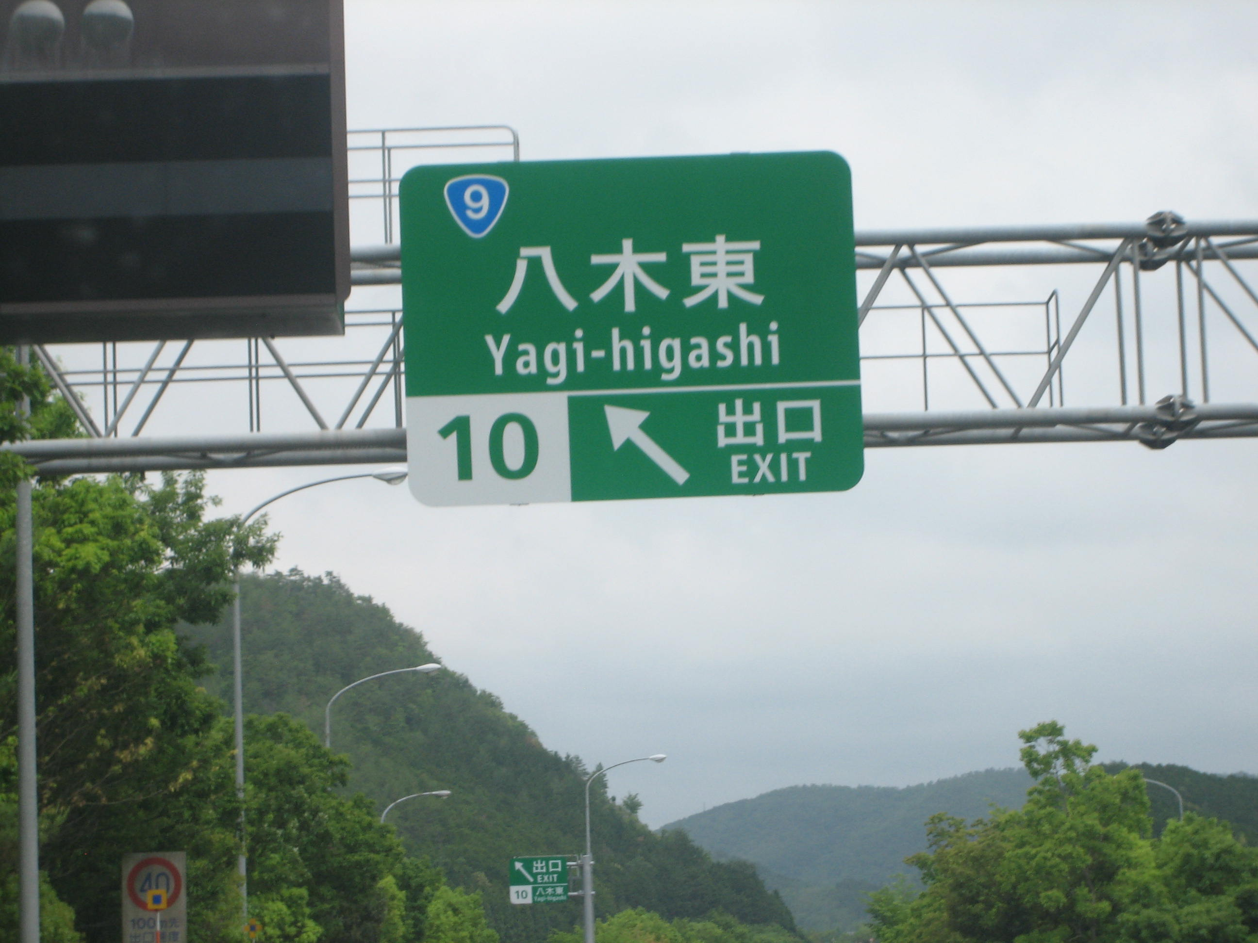 八木東IC